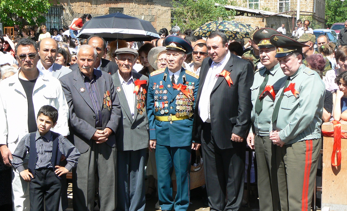 Ագարակի Հայրենական Մեծ պատերազմի հուշարձանի բացման պաշտոնական արարողություն